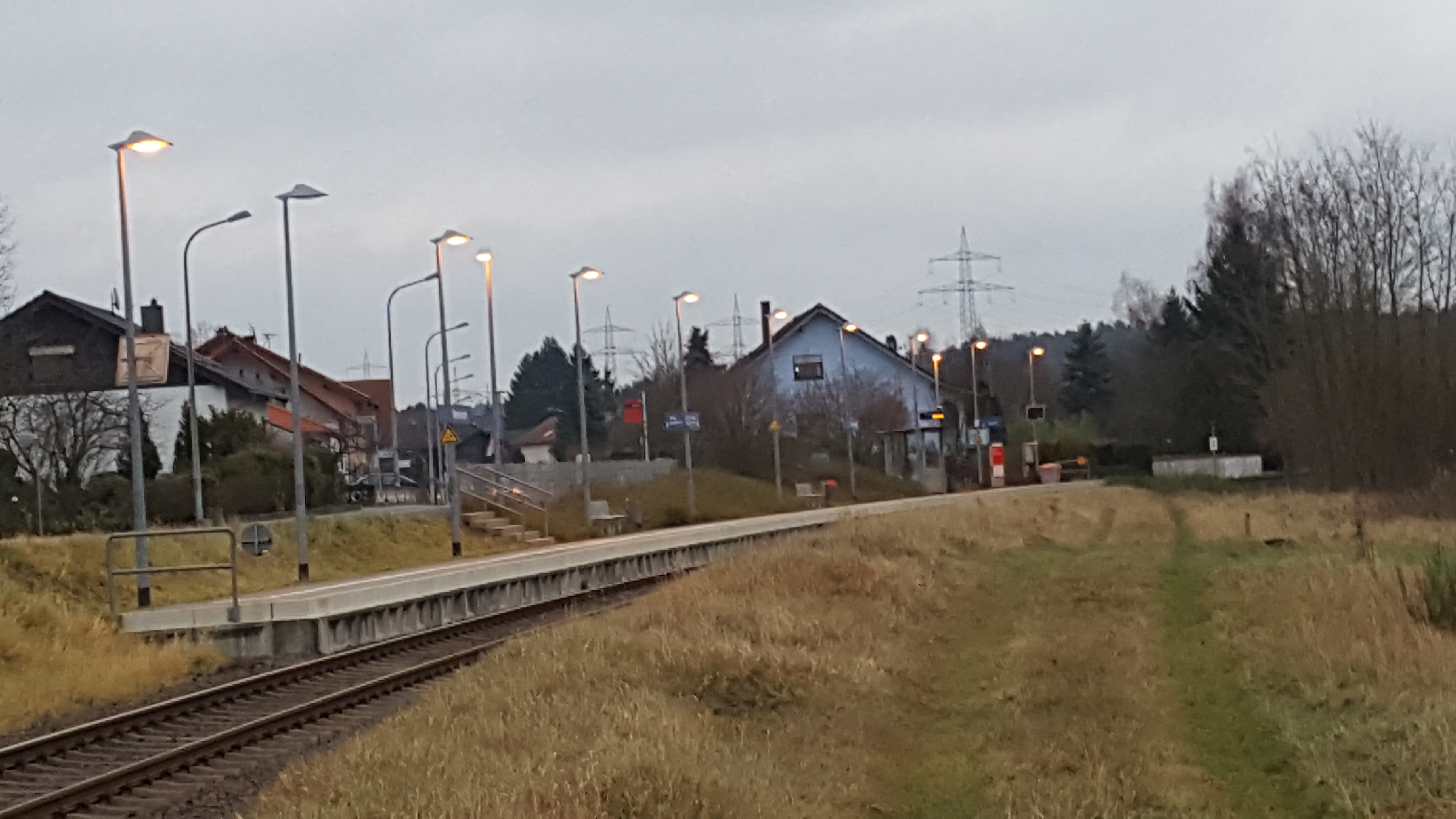 Bahnhof Miesenbach